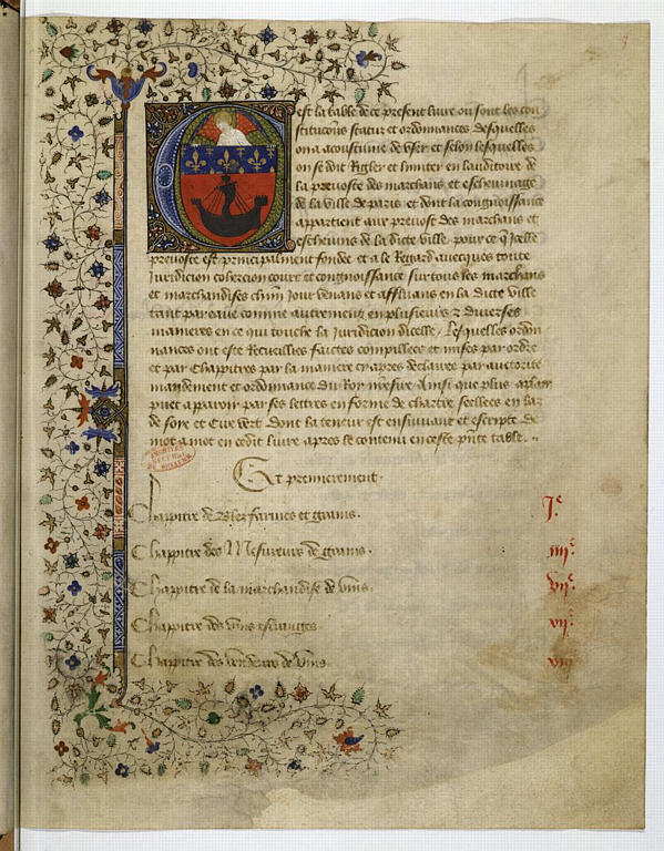 Recueil des ordonnances de la prévôté des marchands de Paris, contenant la transcription de l'ordonnance rendue en février 1416 par Charles VI, ainsi que d'autres textes, le plus récent datant de 1547. Table des matières, illustrée d'une lettre ornée, représentant un grand écu aux armes de la ville de Paris.